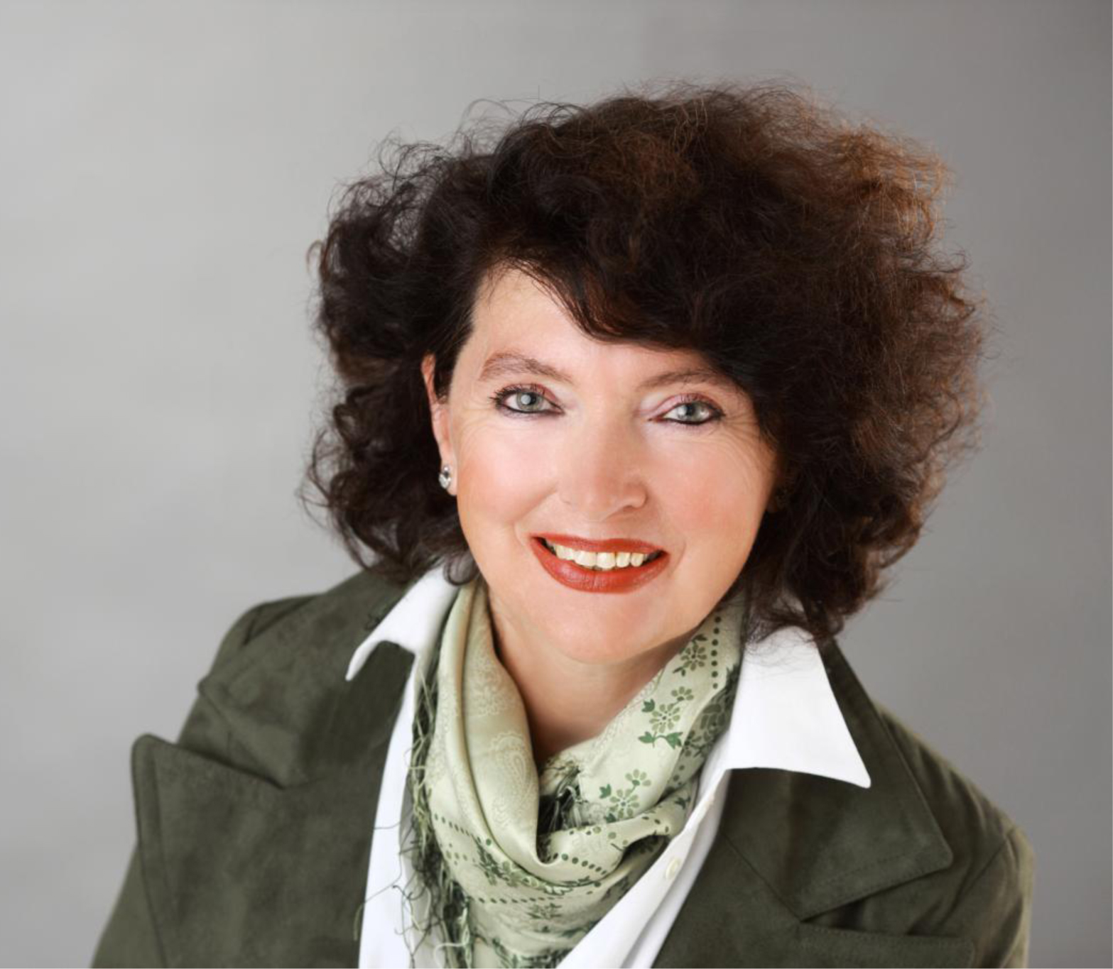 Foto Anne Cyron